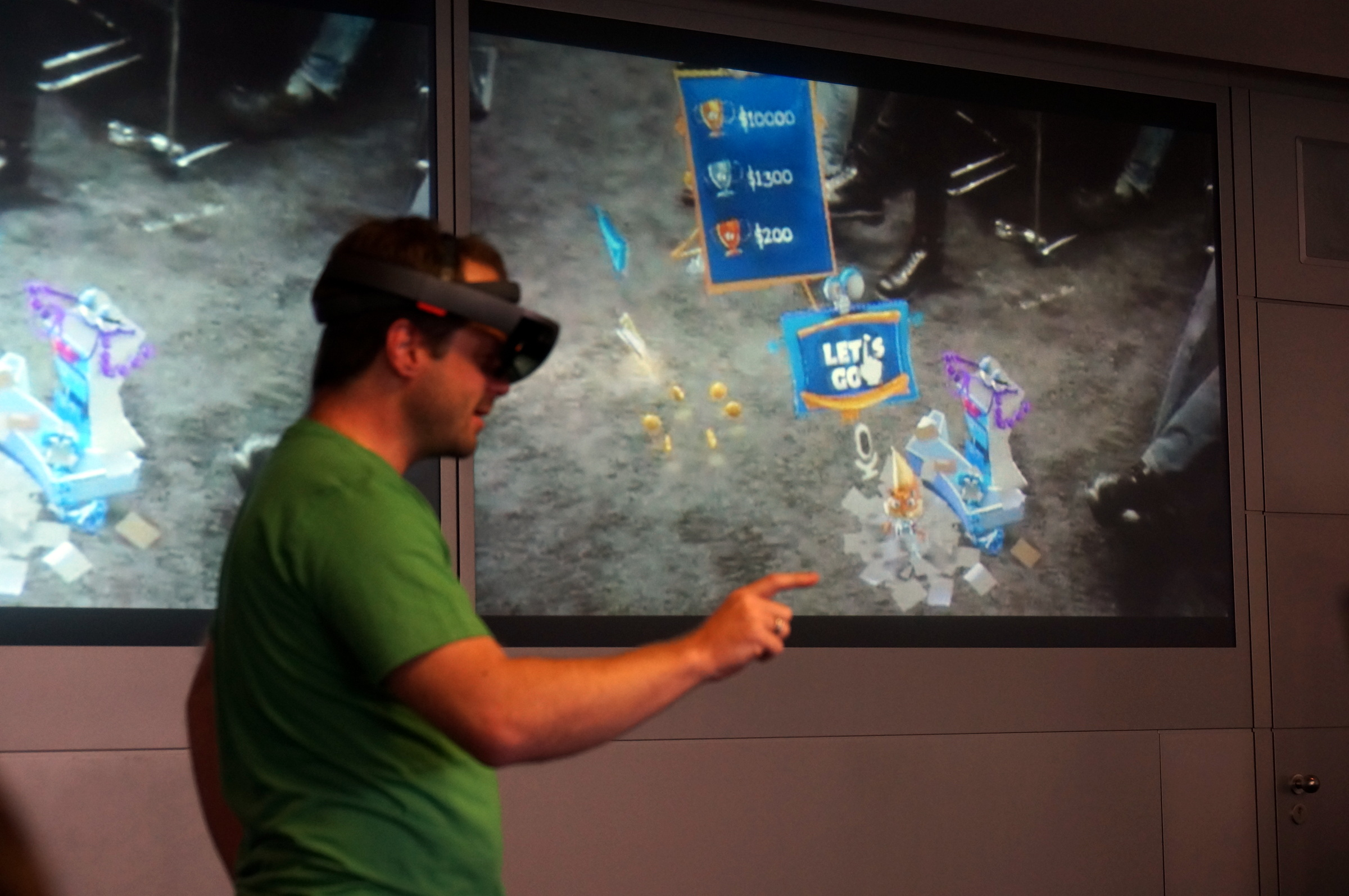 Microsoft HoloLens, Darstellung des Benutzersichtfelds bei Raumprojektion